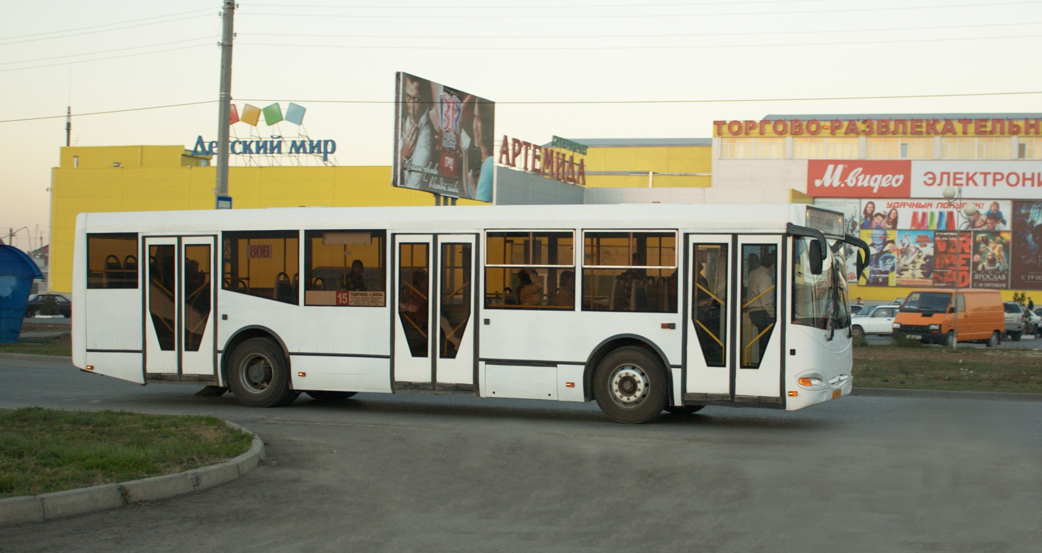 Автобус МаРЗ на одном из маршрутов г. Волгодонска